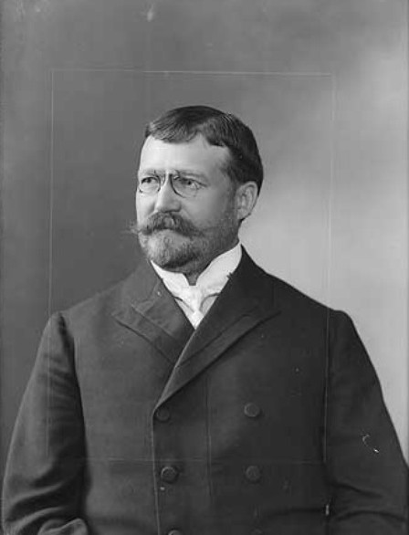 Josef Bukvaj (1867-1926), poslanec Říšské rady